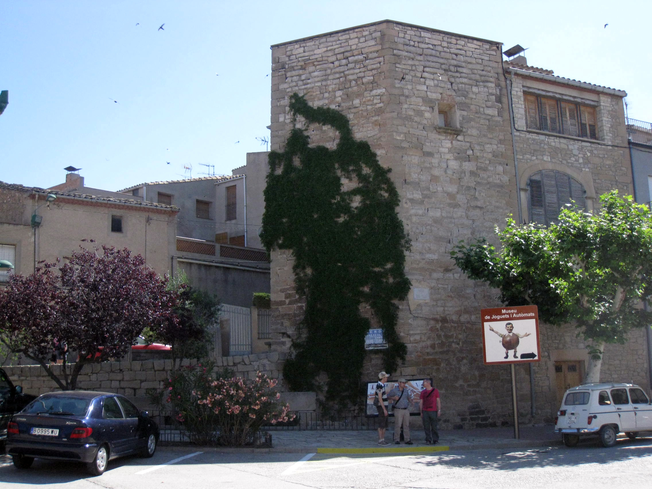 Muralla de Verdú